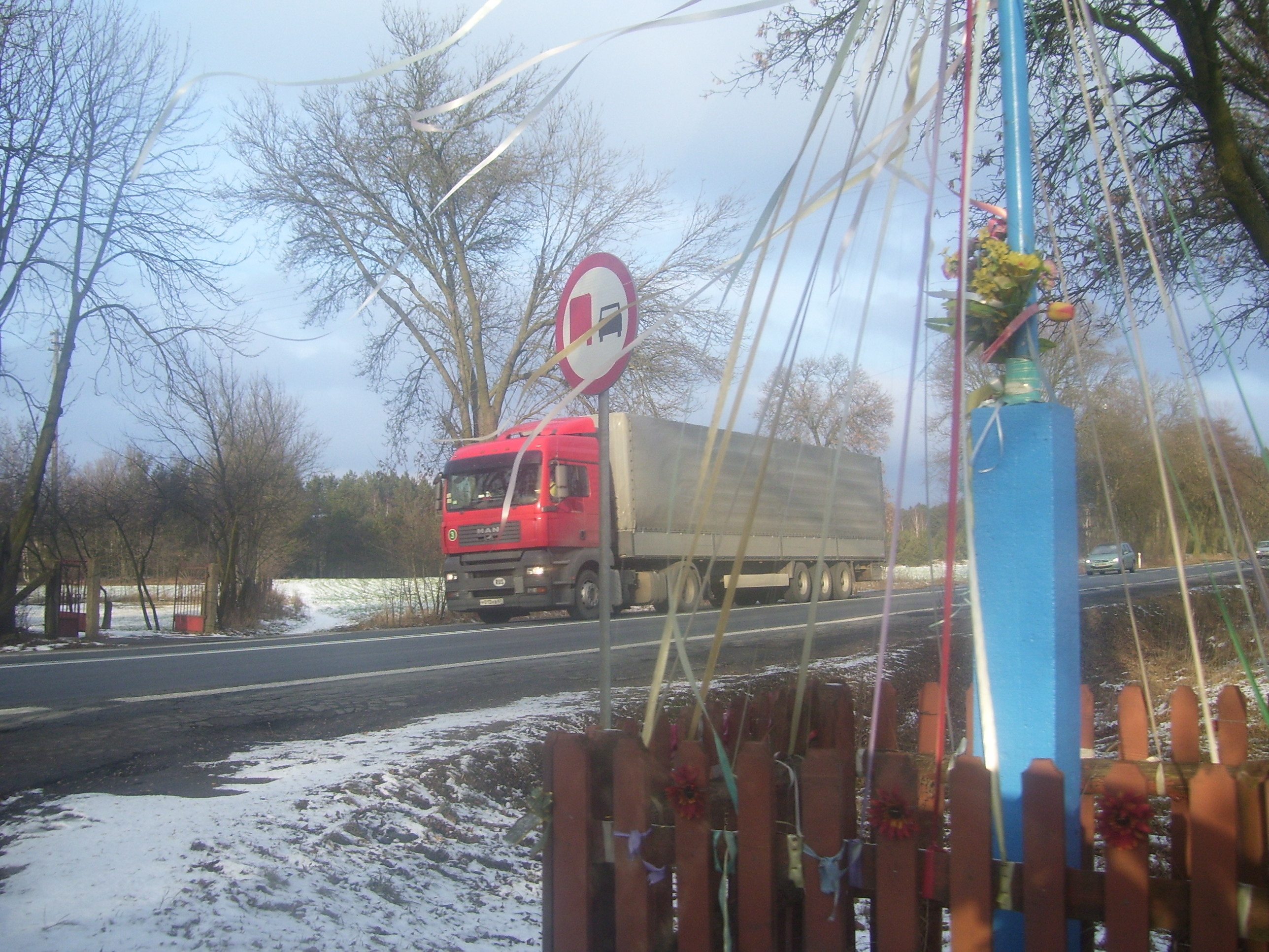 DK8 w Budykierzu